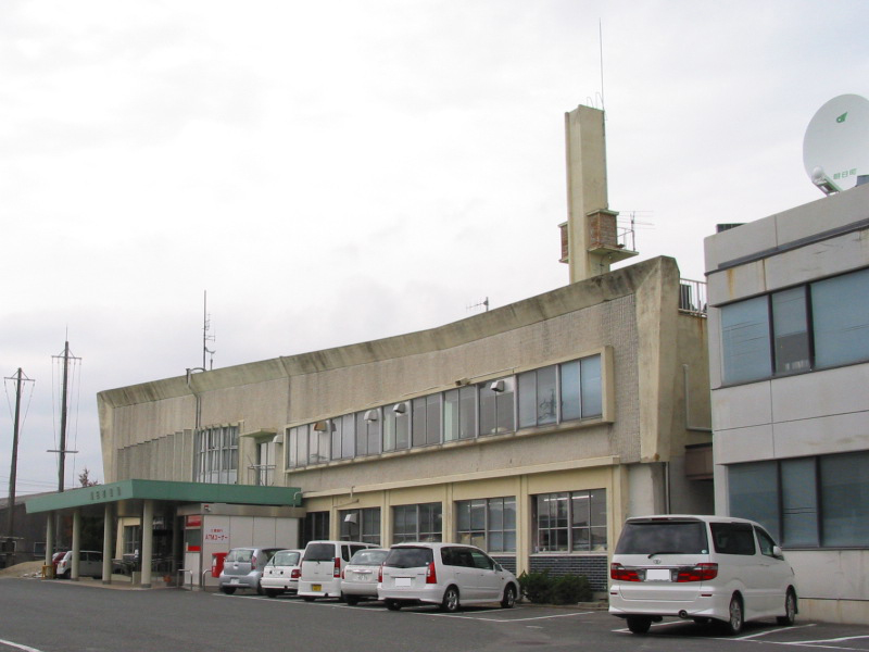 Asahi townhall 朝日町役場三重県三重郡朝日町小向で撮影